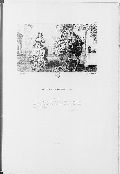 Illustration pour l'œuvre d'Alfred de Musset : Les Caprices de Marianne .